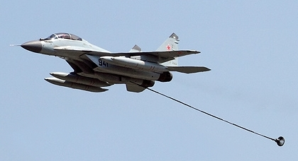 Для иллюстрации статьи